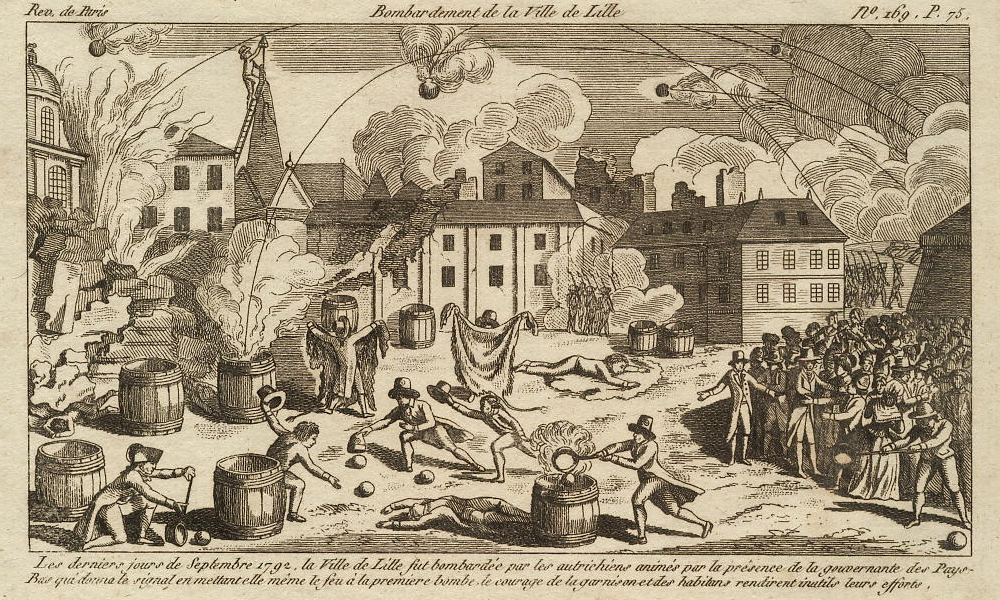 Habitans de Lille. Bombardement par les autrichiens.